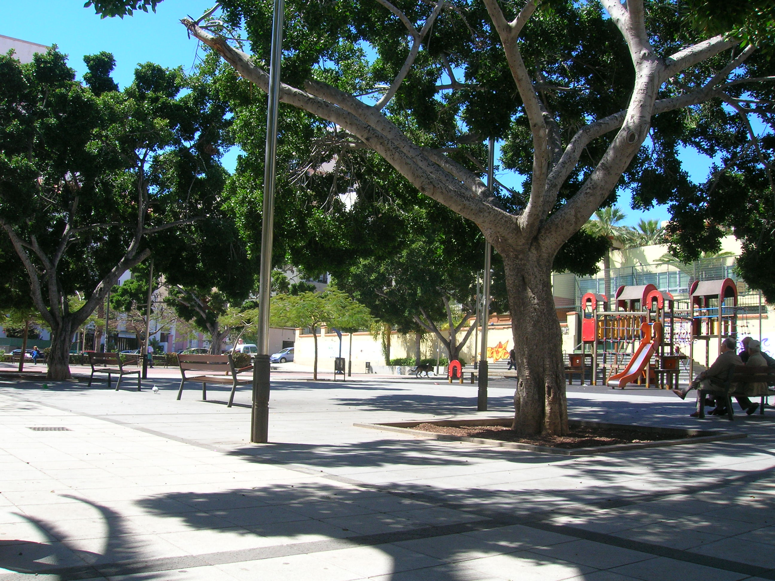 Plaza de Duggi, Santa Cruz de Tenerife. Tomada por Sergio Sánchez, el 23 de marzo de 2006.